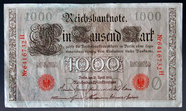 Banknote - 1000 Mark - Deutsches Reich - 21.04.1910